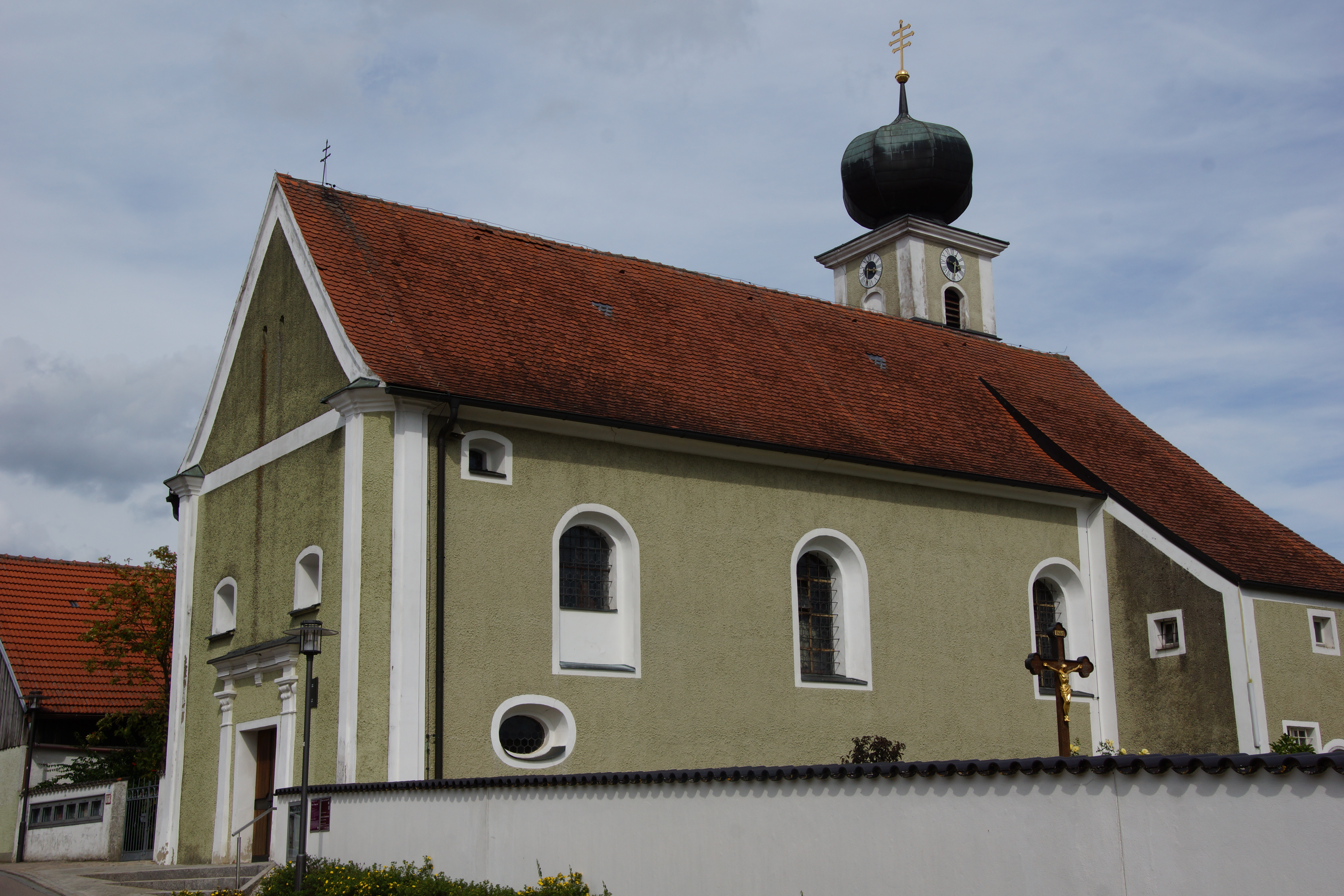 Die katholische Pfarrkirche St. Martin in Oberpfraundorf bei Beratzhausen